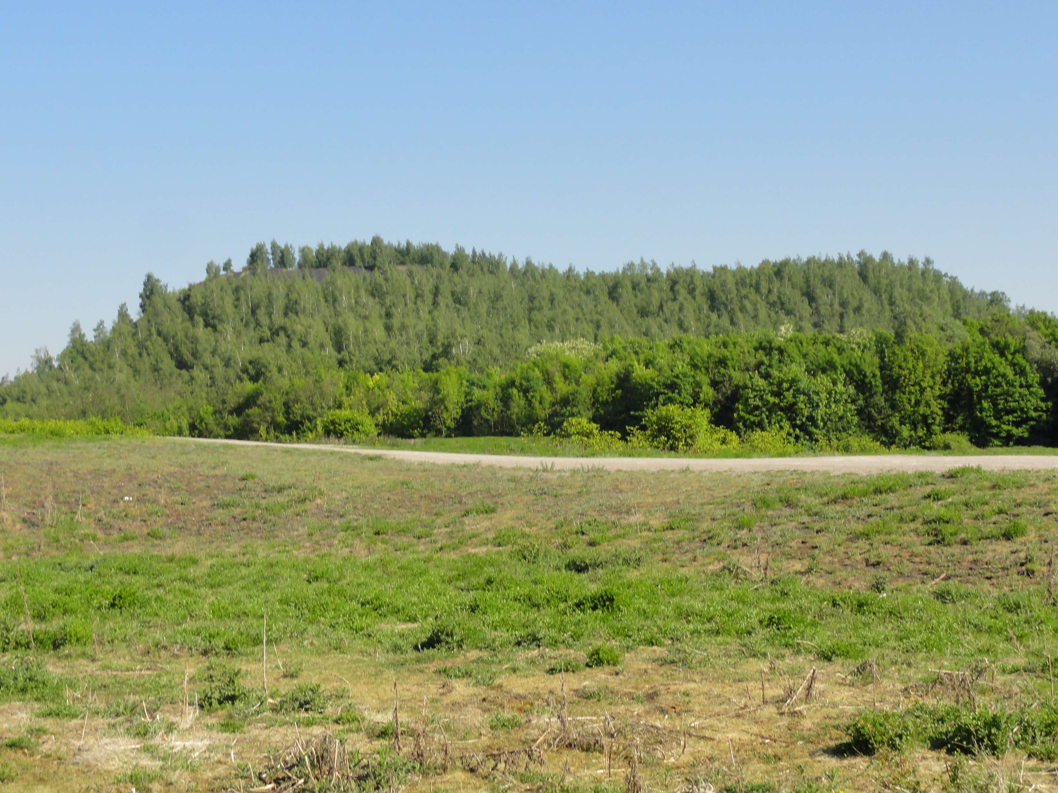 Terril n° 196 dit Ledoux Lavoir, Fosse Ledoux de la Compagnie des mines d'Anzin, Condé-sur-l'Escaut, Nord, Nord-Pas-de-Calais, France.